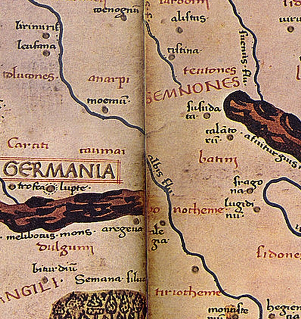 Die Ortsbezeichnung "AREGELIA", Detailbild von der Karte zur Germania magna.